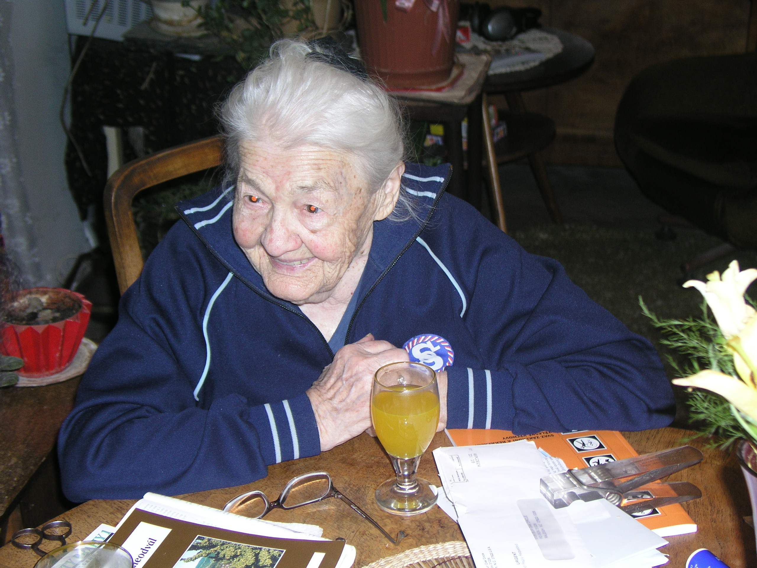 prof. Jana Berdychová v roce 2006